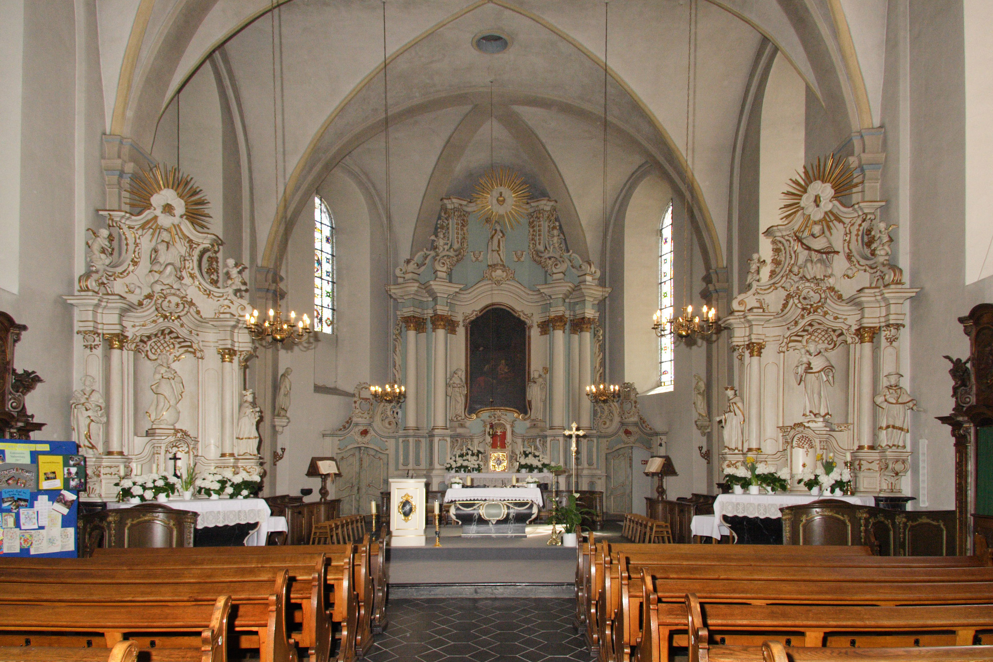 Chor der Nikolaikirche in Brilon